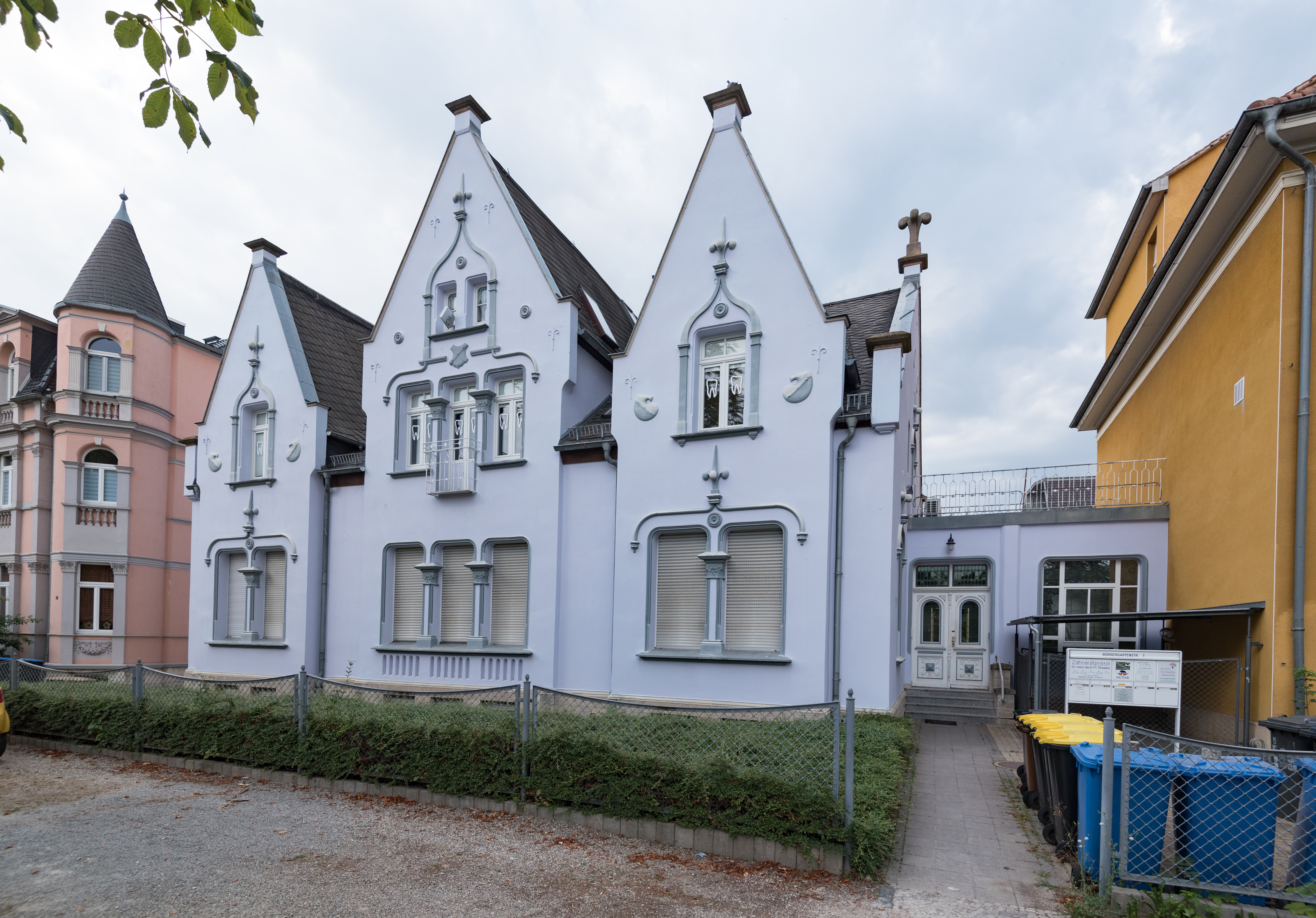 Naumburg (Saale), Bürgergartenstraße 1